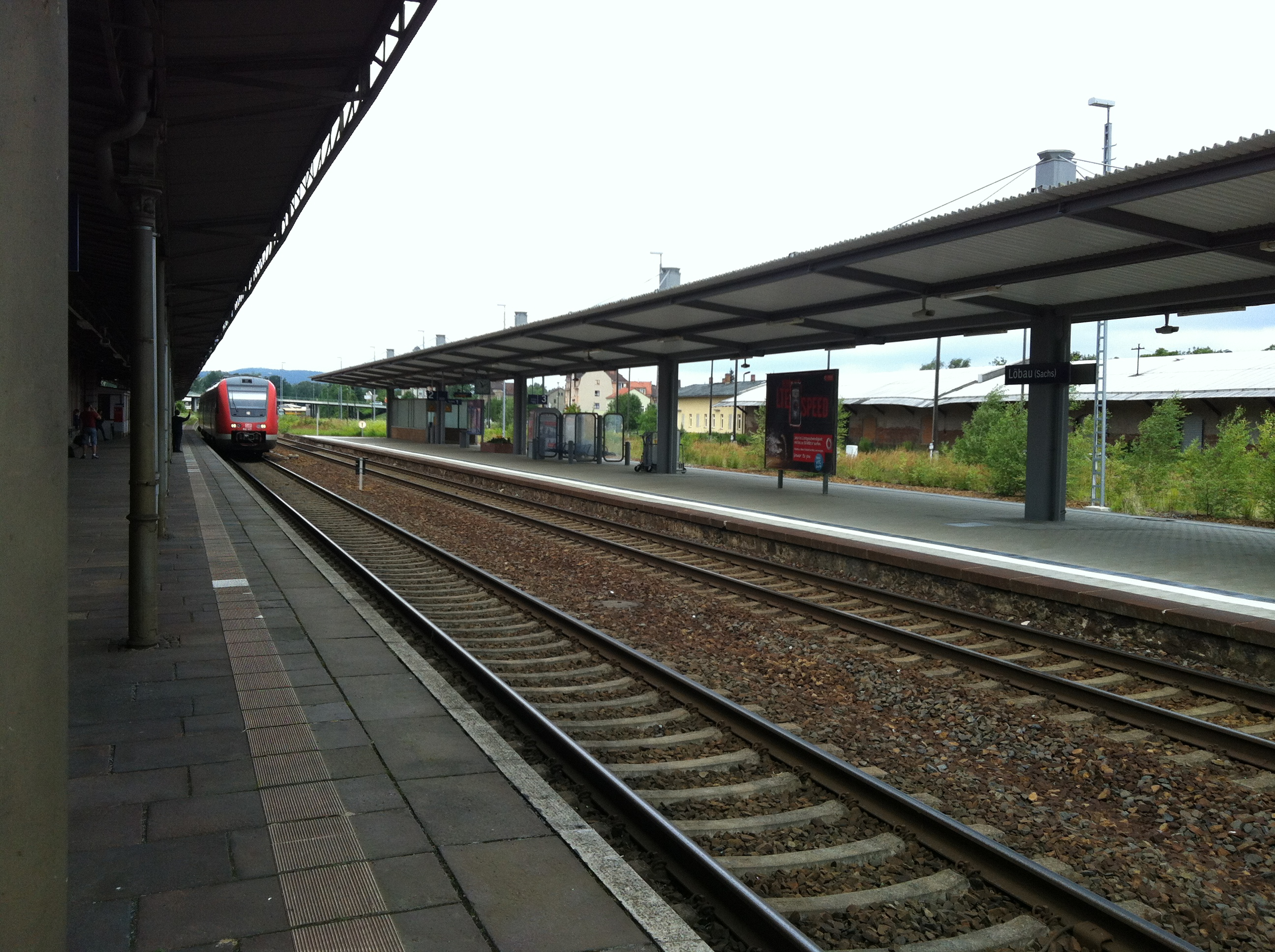 Einfahrt eines Regionalexpress auf der Fahrt von Dresden nach Görlitz am Hausbahnsteig, Gleis 1